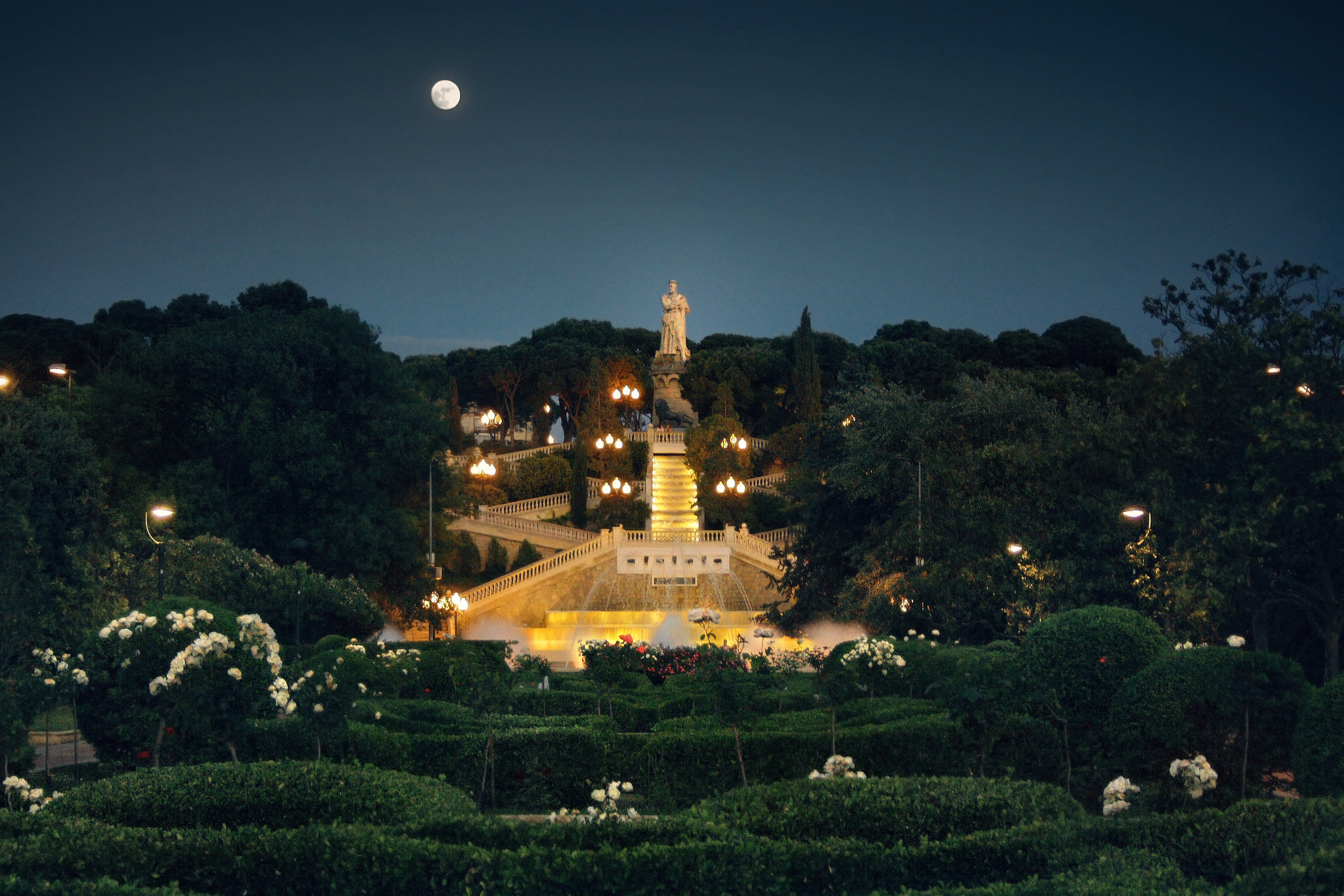 Parque Primo de Rivera de Zaragoza, España